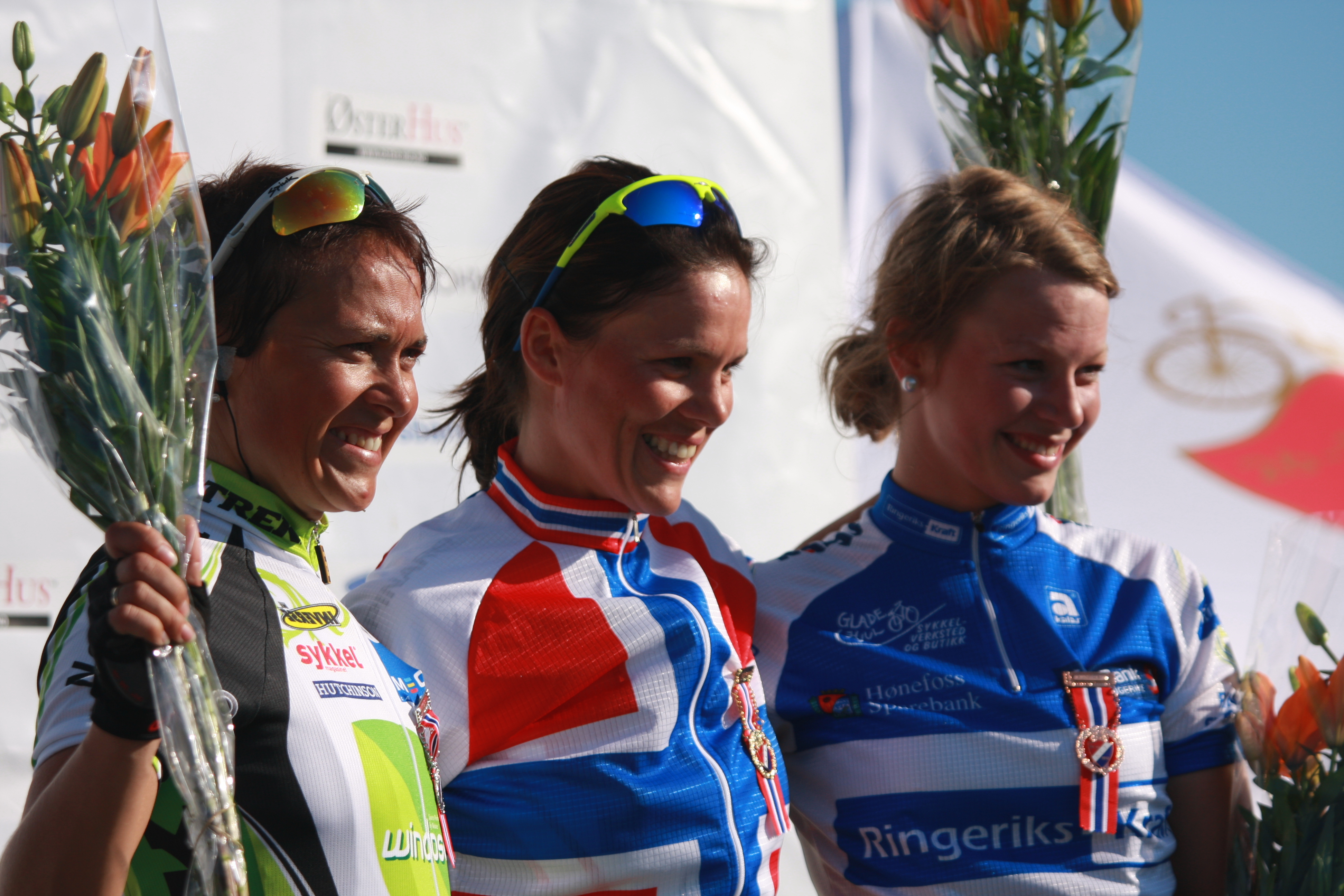 1) Linn Torp, Eidsvoll 2) Elin Steinsbø Fylkesnes 3) Marie Voreland at the podium under NC in cykling